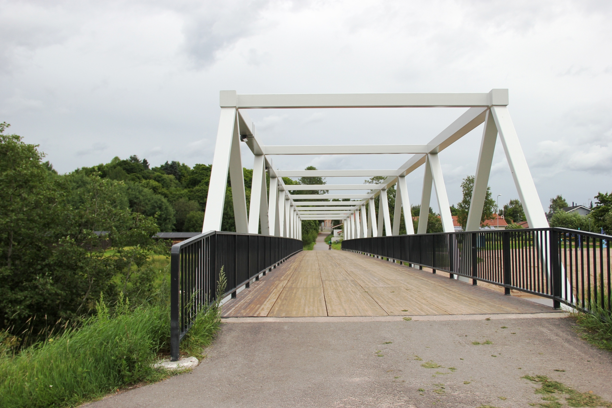 Silta nro 320/HKR. Tuomarinkylän kevyenliikenteen silta yhdistää Tuomarinkartanon Tapaninvainioon. Kuva otettu Tuomarinkartanon suunnasta Tapaninvainioon päin. Suunnittelija Niilo Raita, 1979.